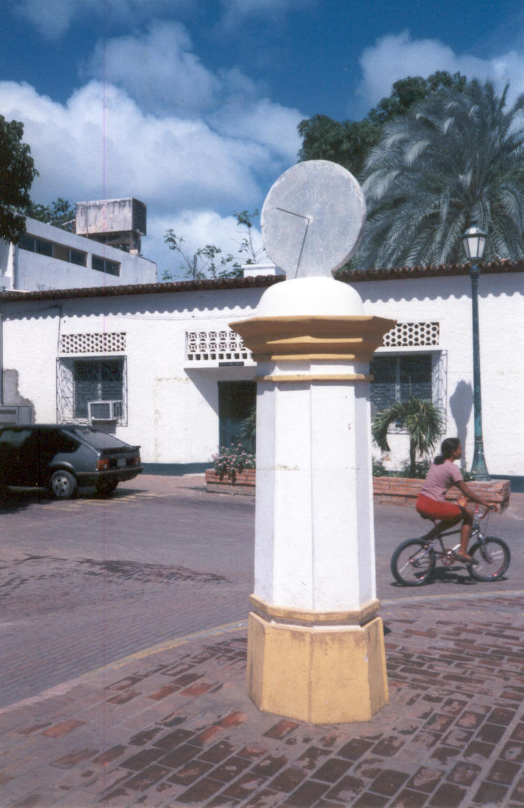 Un antiguo reloj de sol en la Asunción, capital del Estado Nueva Esparta (Venezuela), en la isla de Margarita. Tiene dos discos horarios adosados que coinciden con el paralelo de la ciudad. El disco horario que mira hacia el norte se usa entre los meses de abril y agosto, mientras que el resto del año se usa el disco orientado hacia el sur.